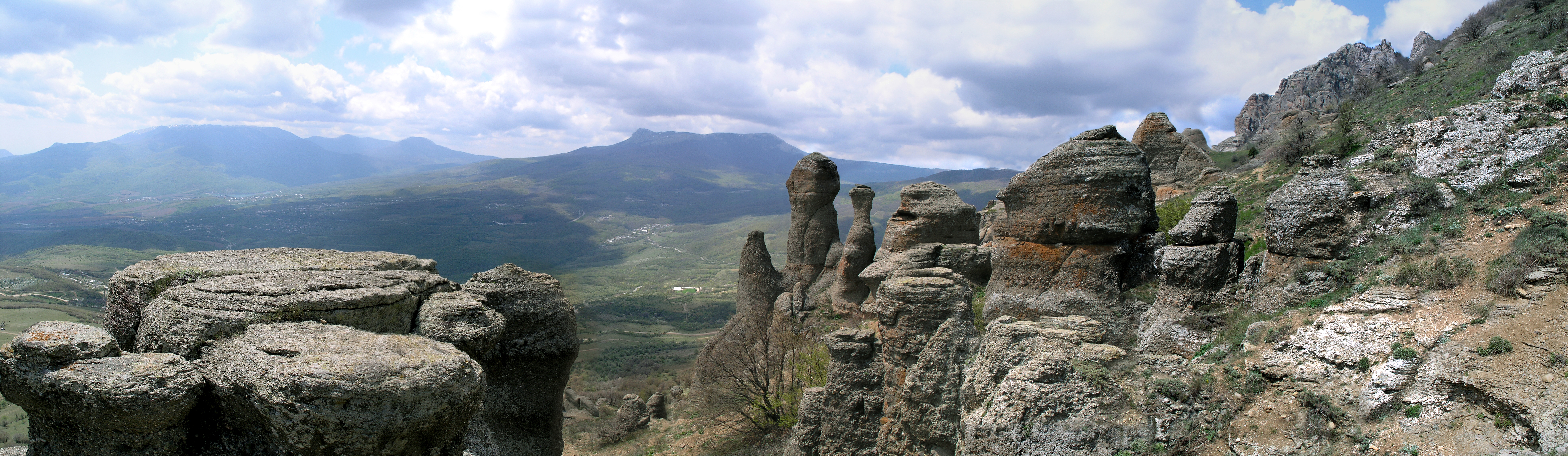 Крым. Вид с Демерджи на Бабуган и Чатыр-Даг (Долина Привидений)